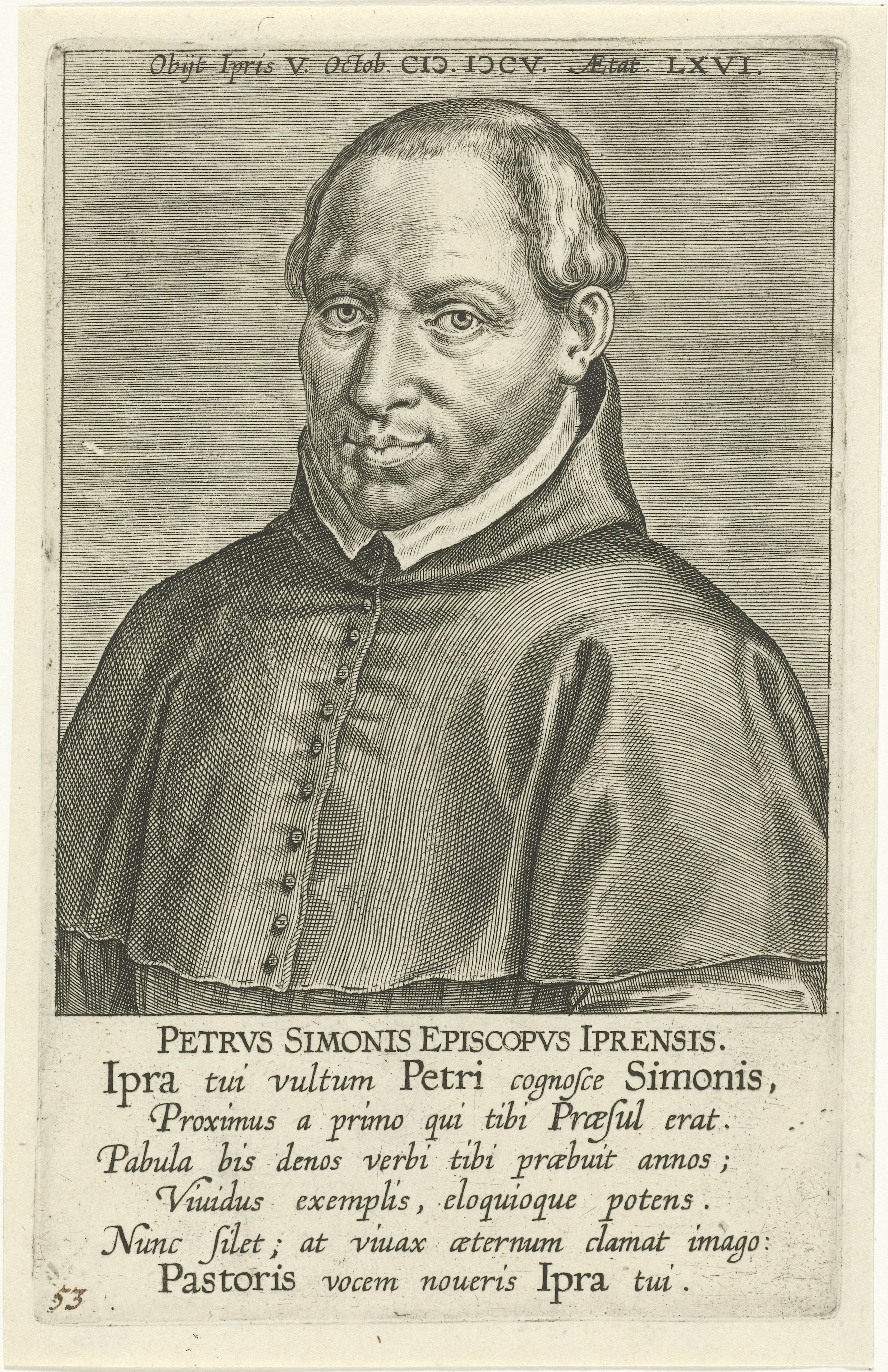 IdentificatieTitel(s): Portret van Petrus SimonsPetrvs Simonis Episcopvs Iprensis (titel op object)Bekende schrijvers uit de Nederlanden (serietitel)Bibliotheca Belgica (serietitel)Objecttype: prent boekillustratie Objectnummer: RP-P-1912-739Catalogusreferentie: New Hollstein Dutch fig. 44-2(2)Opmerking: 2(2) aan de hand van aanwezige staten RijksmuseumOpschriften / Merken: nummer, recto linksonder, geschreven: ‘53’verzamelaarsmerk, verso midden onder, gestempeld: Lugt 2228Omschrijving: Portret van Petrus Simons, bisschop van Ieper. Buste naar links. De prent heeft een Latijns boven- en onderschrift en maakt deel uit van een serie van bekende schrijvers uit de Nederlanden.VervaardigingVervaardiger: prentmaker: Philips Galle (toegeschreven aan atelier van)schrijver: Aubert le Mireuitgever: Franciscus FoppensPlaats vervaardiging: prentmaker: Antwerpenschrijver: Antwerpenuitgever: BrusselDatering: 1608 en/of 1739Fysieke kenmerken: gravureMateriaal: papier Techniek: graveren (drukprocedé)Afmetingen: plaatrand: h 166 mm × b 105 mmToelichtingBoekillustratie uit Johannes Franciscus Foppers, 'Bibliotheca Belgica', Brussel 1739.OnderwerpWie: Petrus SimonsVerwerving en rechtenCredit line: Schenking van de heer J.J. de Graaf, HaarlemVerwerving: schenking 1912Copyright: Publiek domein